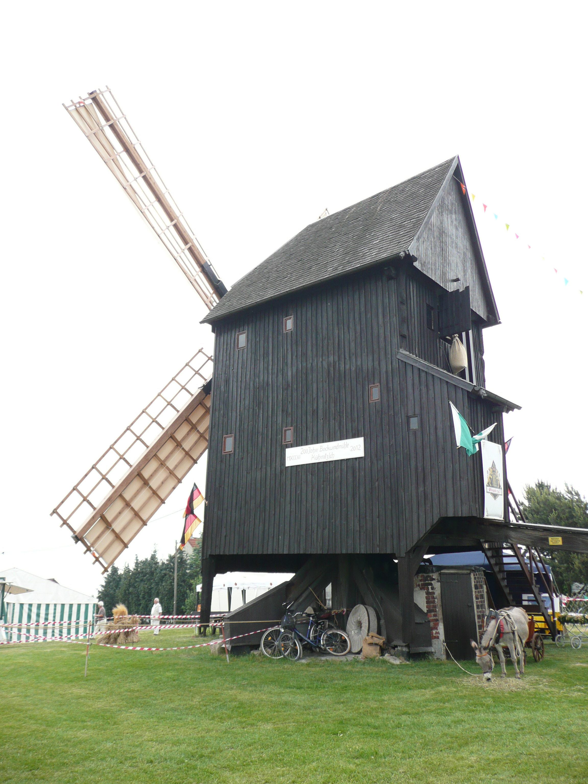 Bockwindmühle Kühnitzsch zur Festveranstaltung anlässlich des Jubiläums 200jährigen Jubiläums und bundesweite zentrale Eröffnungsveranstaltung des 19. Deutschen Mühlentages 2012